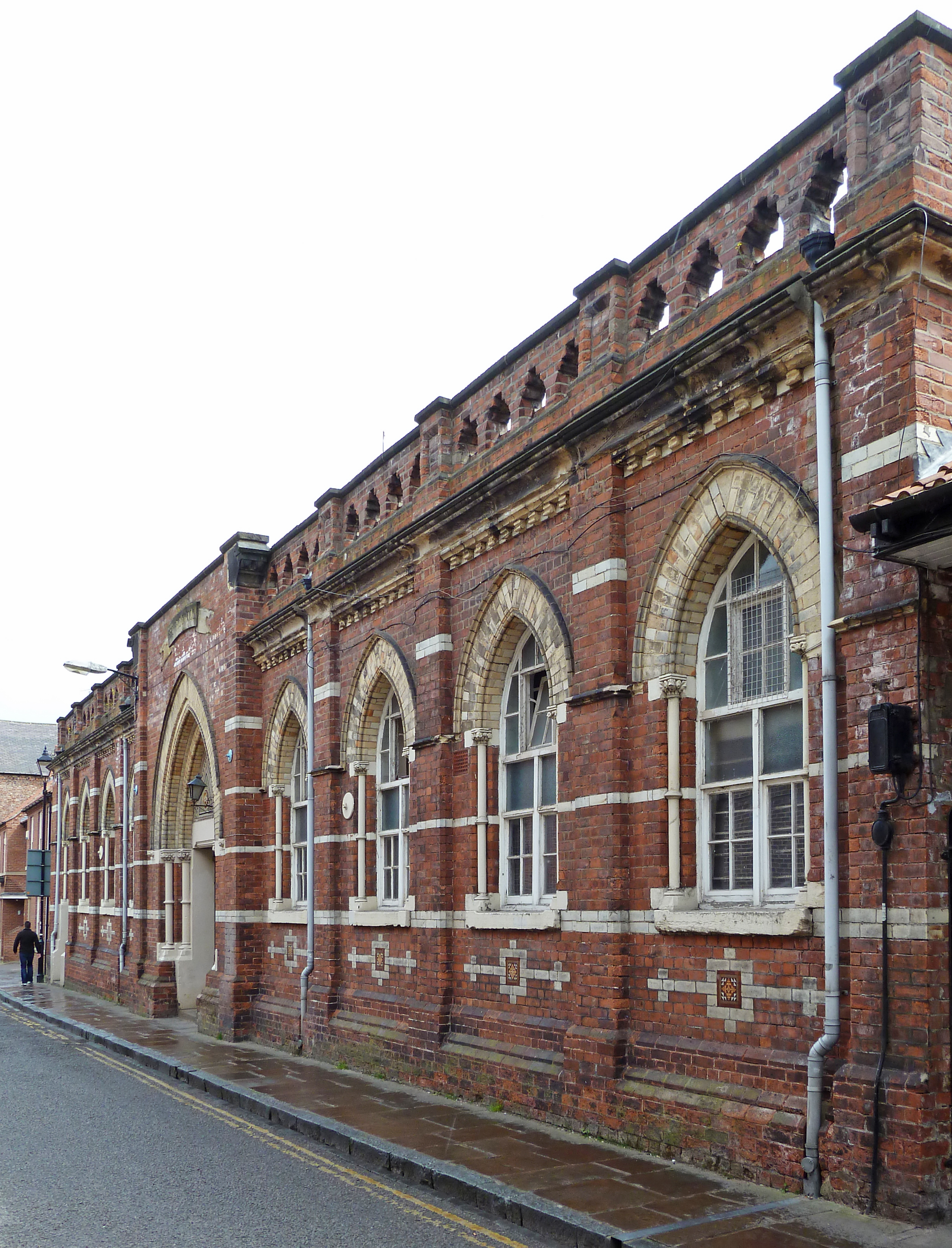 Drill Hall (former), St Andrewgate, York